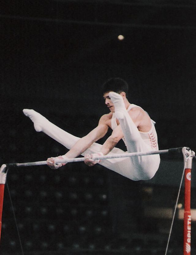 Österreichs 14-facher Staatsmeister im Kunstturnen Reinhard Blum.